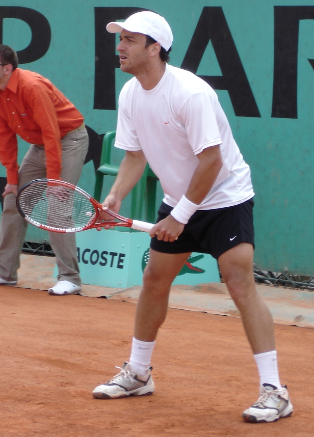 Franco Squillari pendant les Qualifs de Roland-Garros en 2005